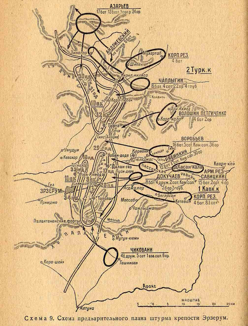 Схема предварительного плана штурма крепости Эрзурум русскими войсками в 1916 году